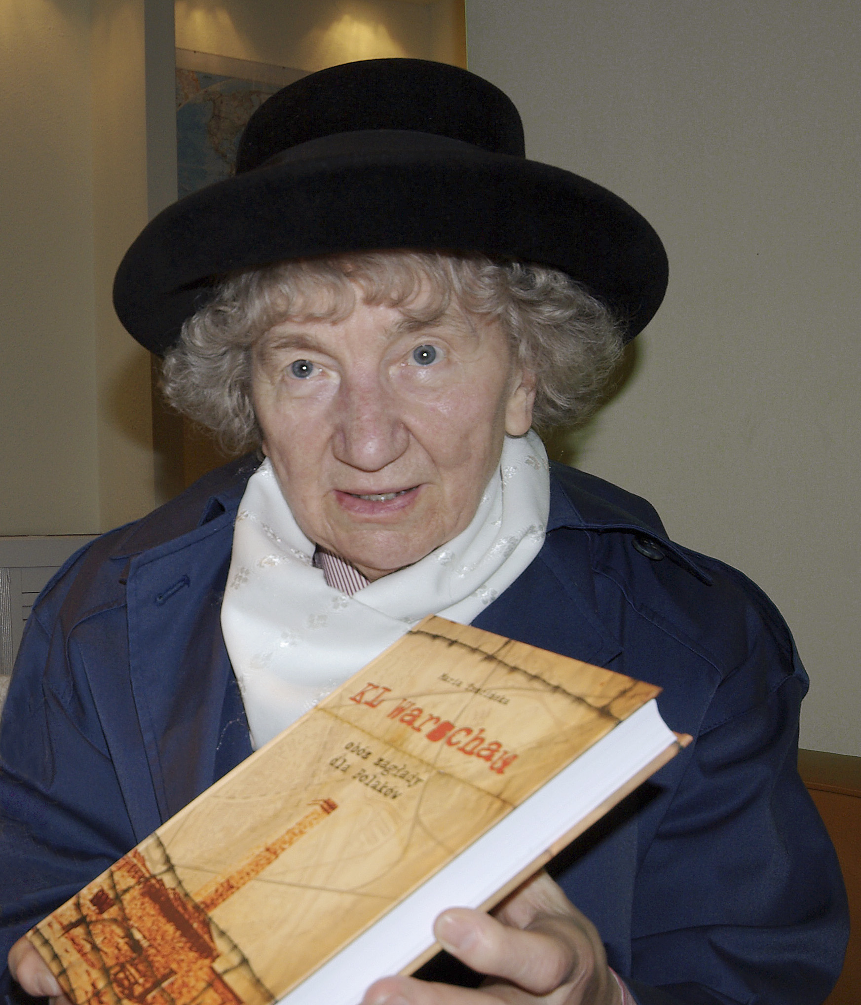 Polska sędzia Maria Trzcińska, autorka książki KL Warschau - obóz zagłady dla Polaków w świetle dokumentów. Fot. Błażej Pajda